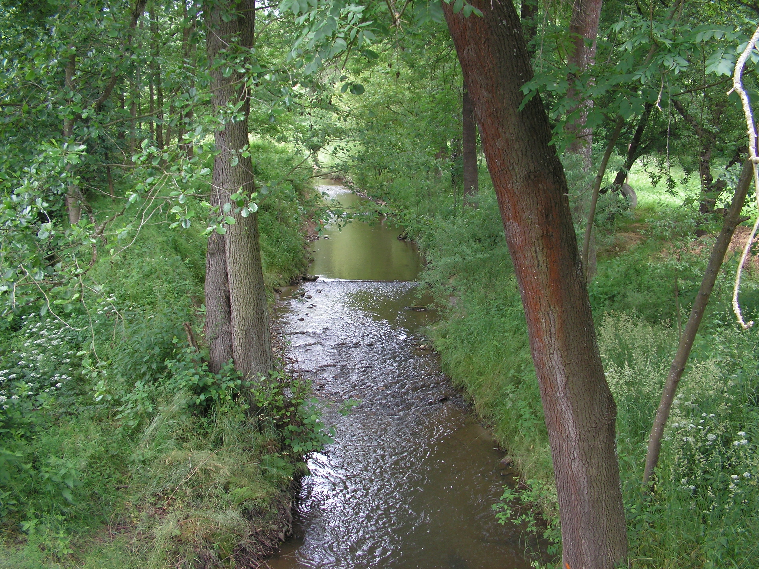 Losinský potok v Kácově